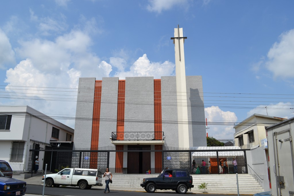 Iglesia de El Carmen de Alajuela